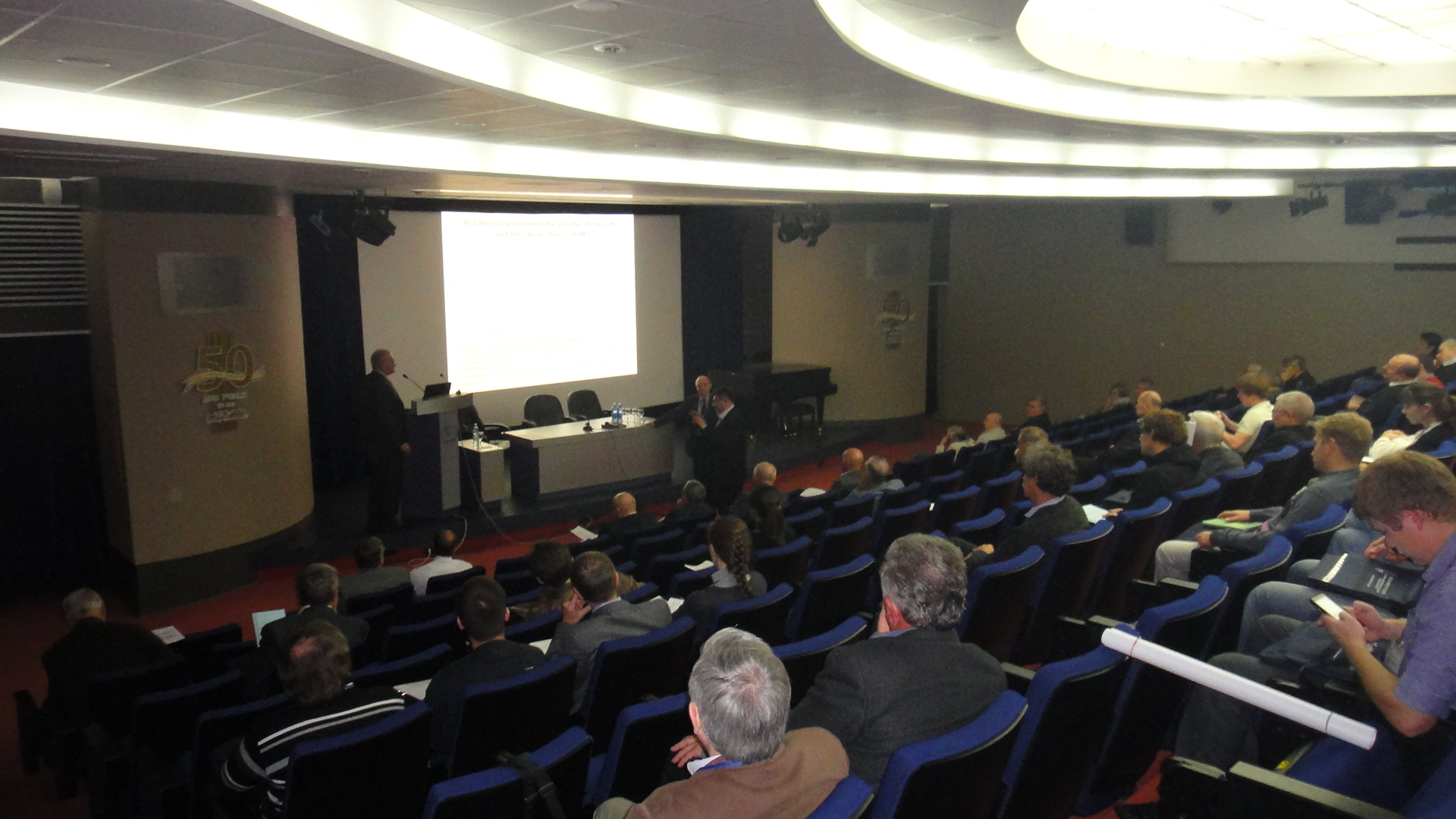 Малый зал Дома учёных (Новосибирский Академгородок)